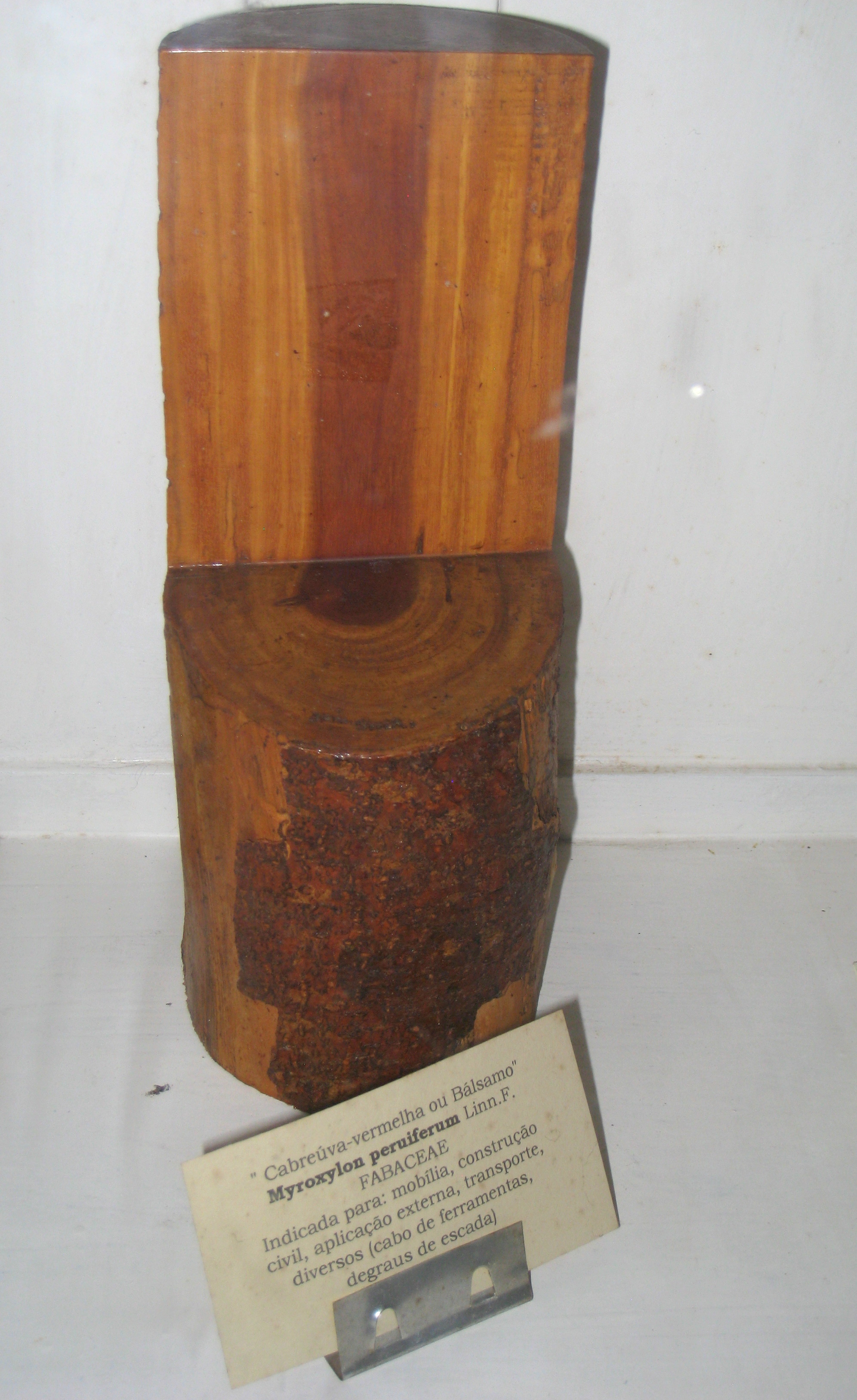 Myroxylon peruiferum specimen in the Museu Botânico Dr. João Barbosa Rodrigues, Jardim Botânico de São Paulo, São Paulo City, SP, Brazil.